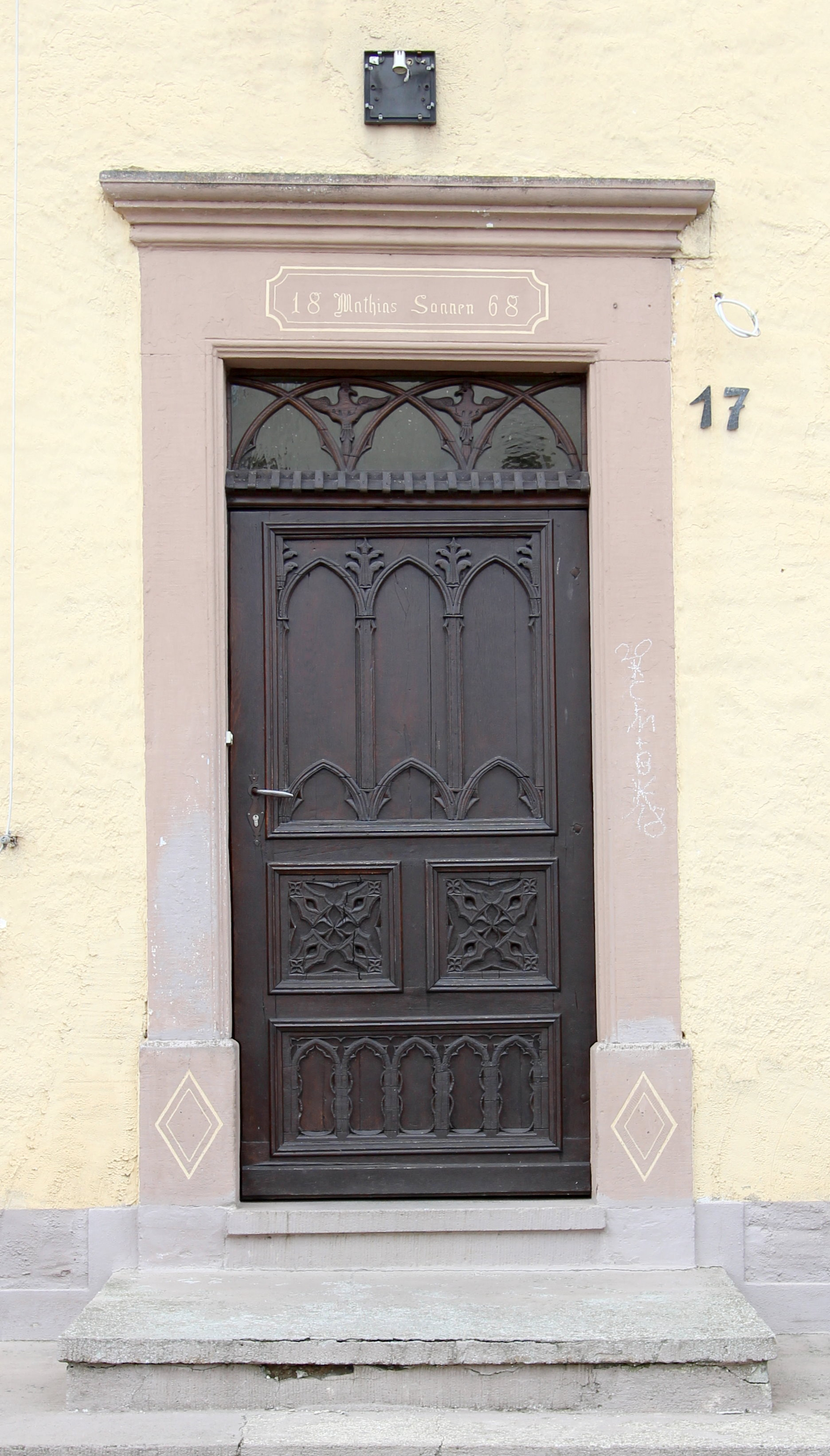 54634 Matzen, Lerchenstraße, an Nr. 17. Portal, Türsturz bezeichnet 1868, Türblatt und Oberlicht neugotisch. Erbauer des Hauses Mathias Sonnen. Türblatt und Oberlicht sind in phantasievollerweise mit neugotischem Schnitzwerk verziert. Aufnahme von 2018.